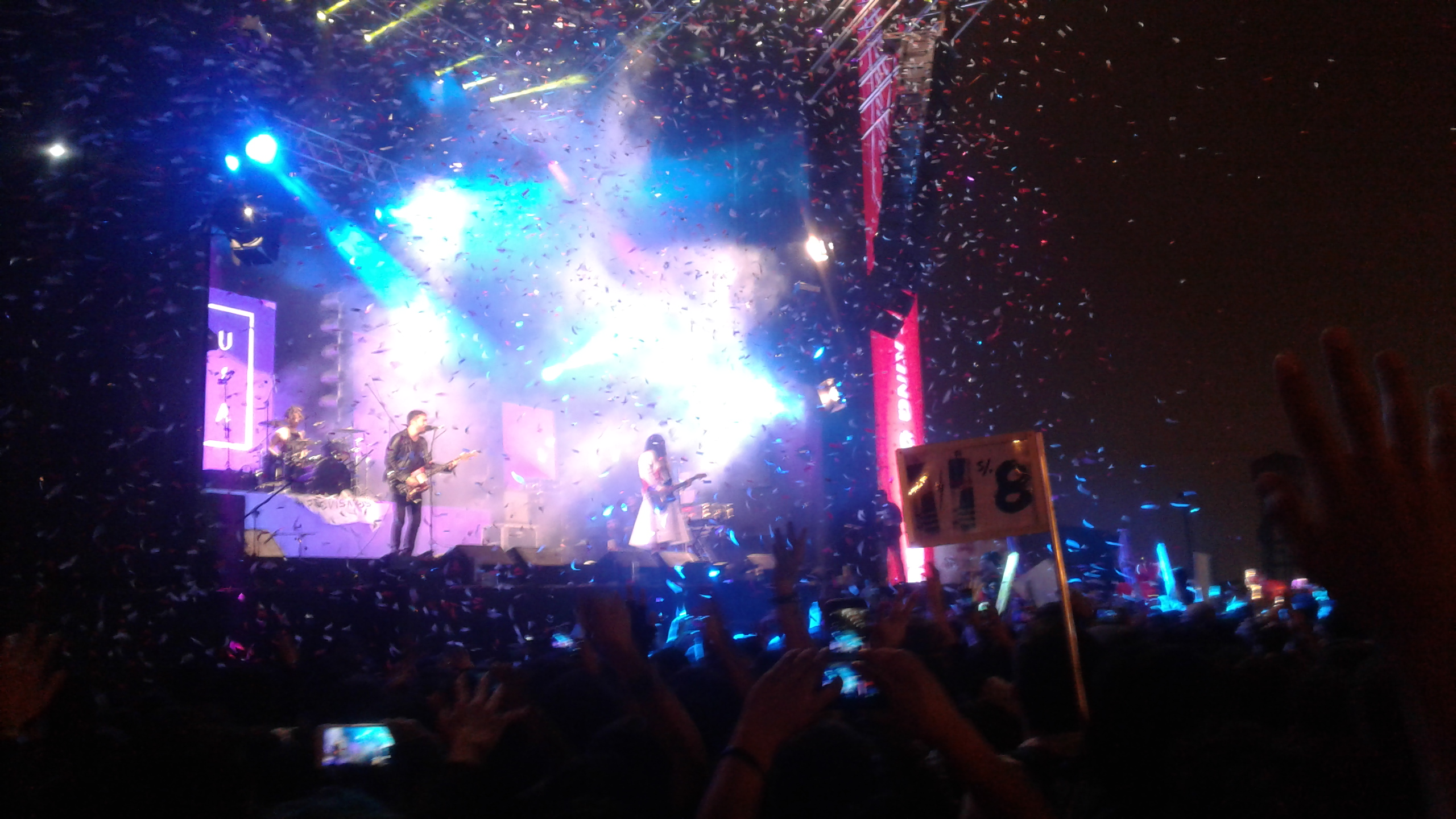 La banda de rock TOURISTA en un concierto (fiesta).